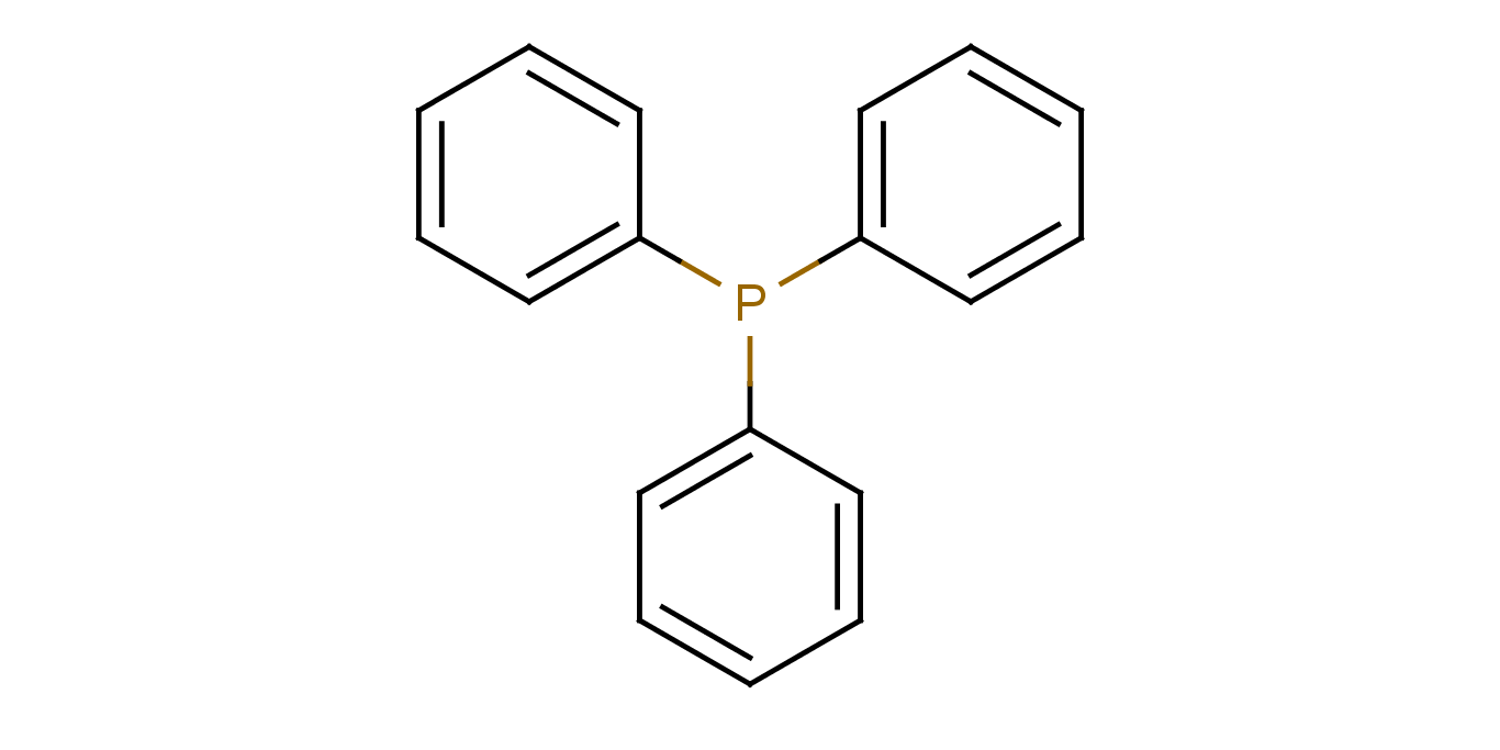 trifenüülfosfiin.